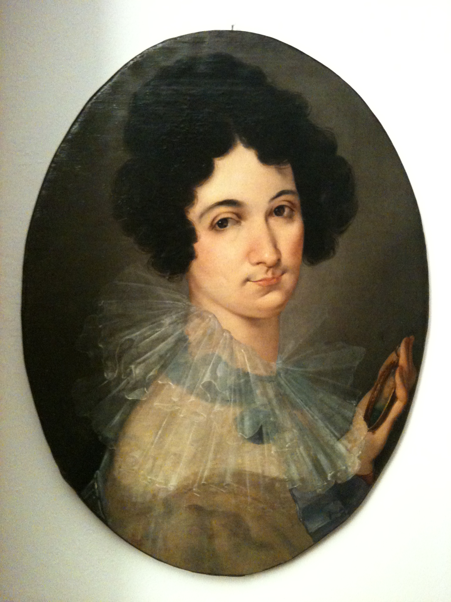 Teresa Brignole Trissino dal Vello d'Oro (1798 – 1824). Olio su tela. Collezione privata